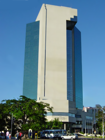 Palacio de Justicia, sede de los poderes jurídicos en Santa Cruz de la Sierra, Bolivia.